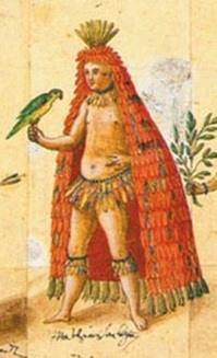 Aquarela de ìndios Brasileiros - Índio com Manto Tupinambá